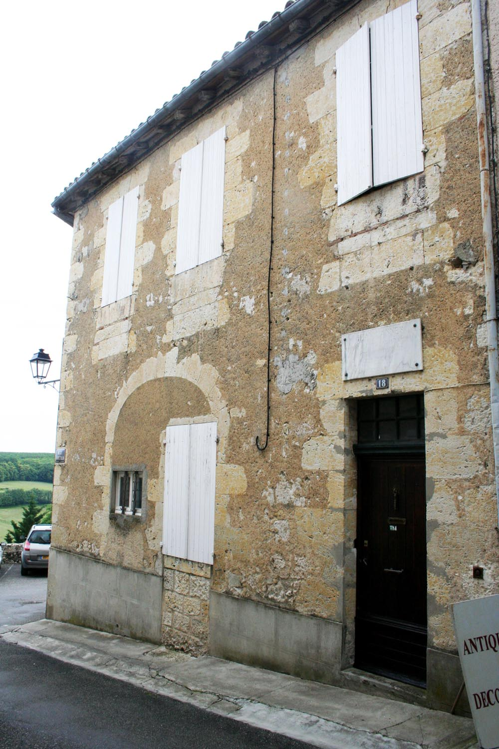 Maison natale du maréchal Lannes, 18, rue Montebello à Lectoure (Gers, France)